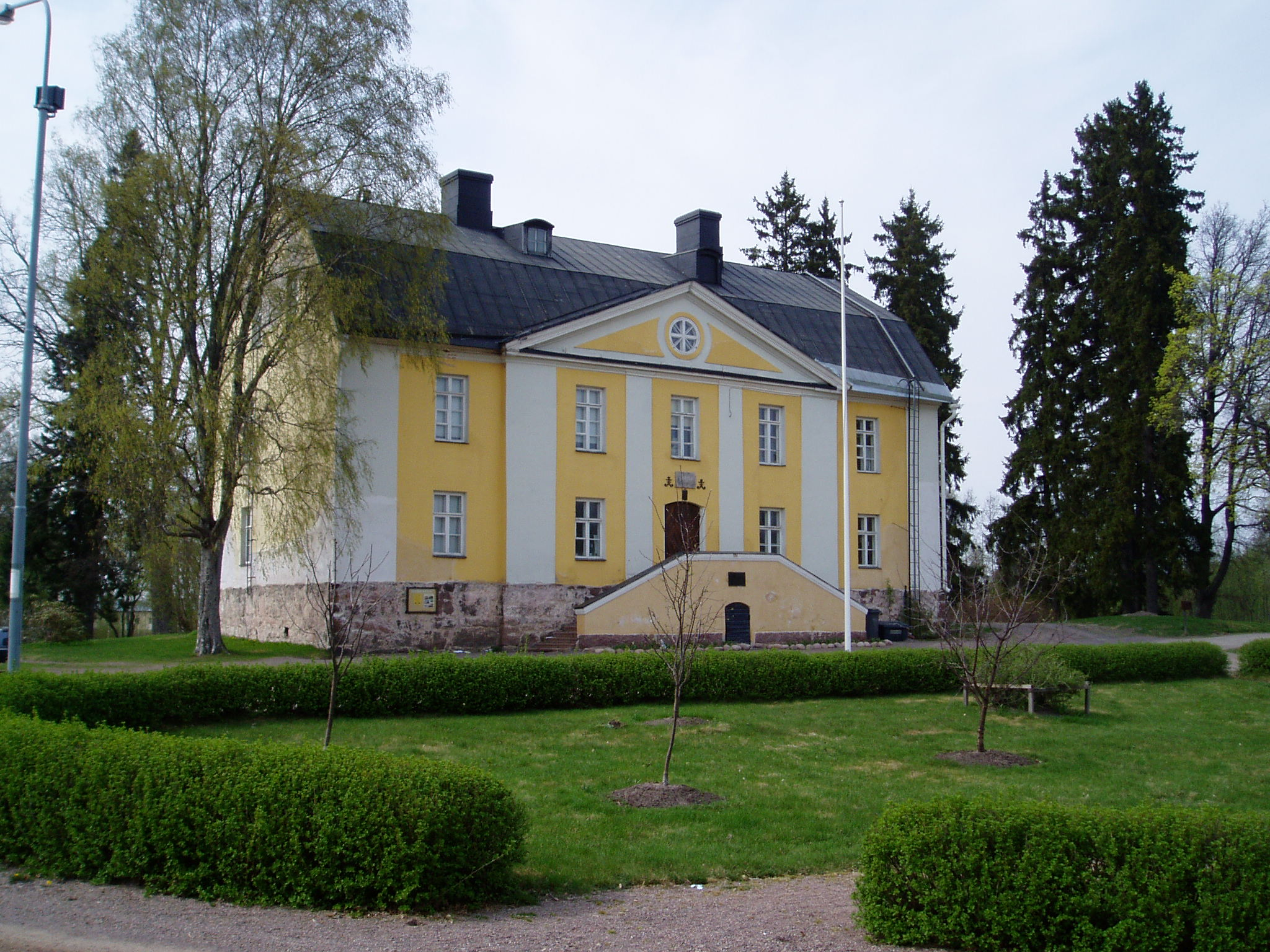 Loviisan linnoituksen komendantintalo vuodelta 1755. Foto: Ohto Kokko